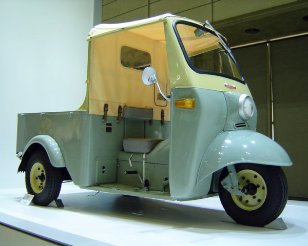 ダイハツ・ミゼット 東京モーターショー2004にて